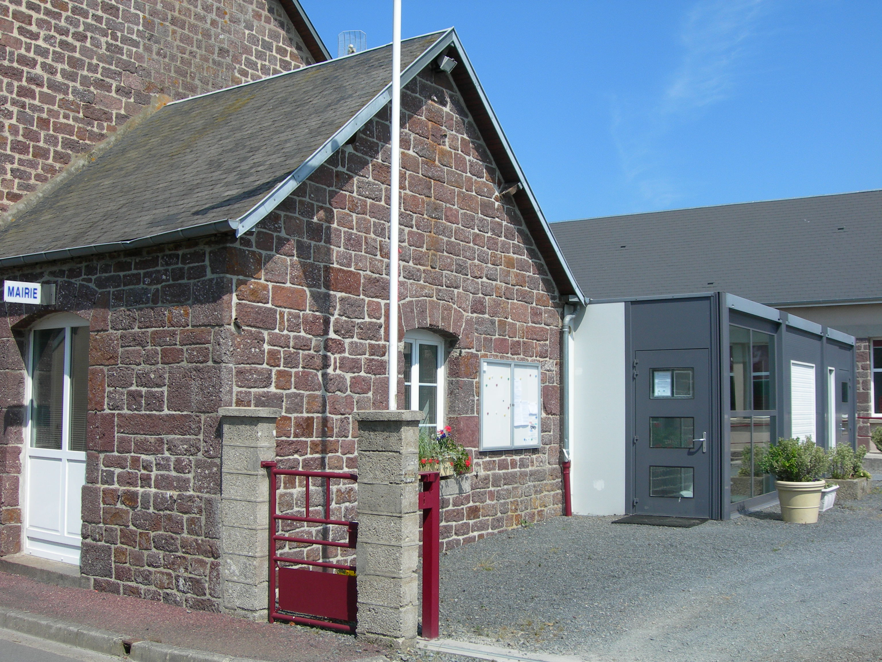 Mairie de Le Mesnil-Opac, Manche, Normandie, France